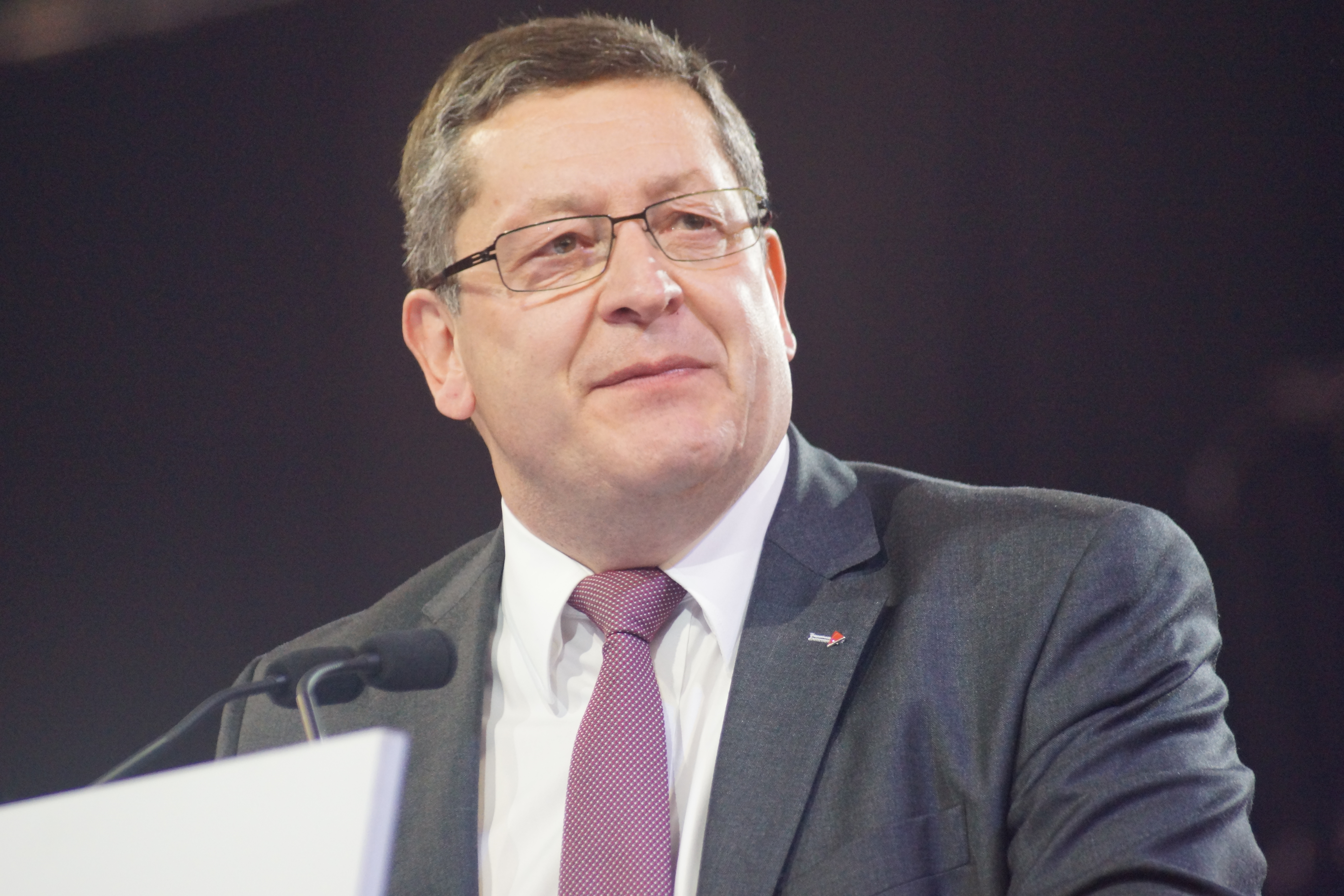 Thierry Giet lors d'un meeting de François Hollande à Lille, le 17 avril 2012.